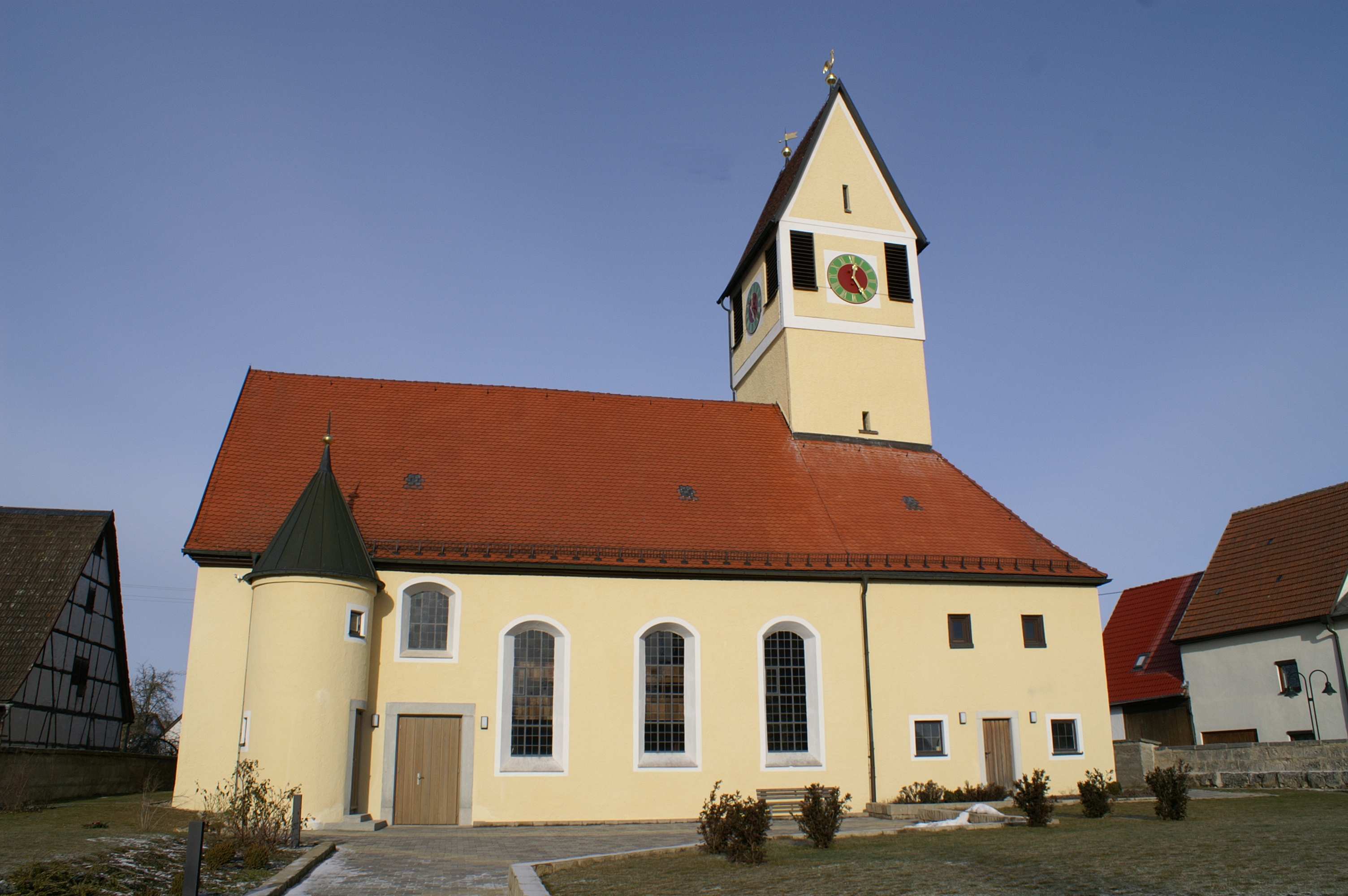 Evangelische Peter- und Paulskirche Sontheim